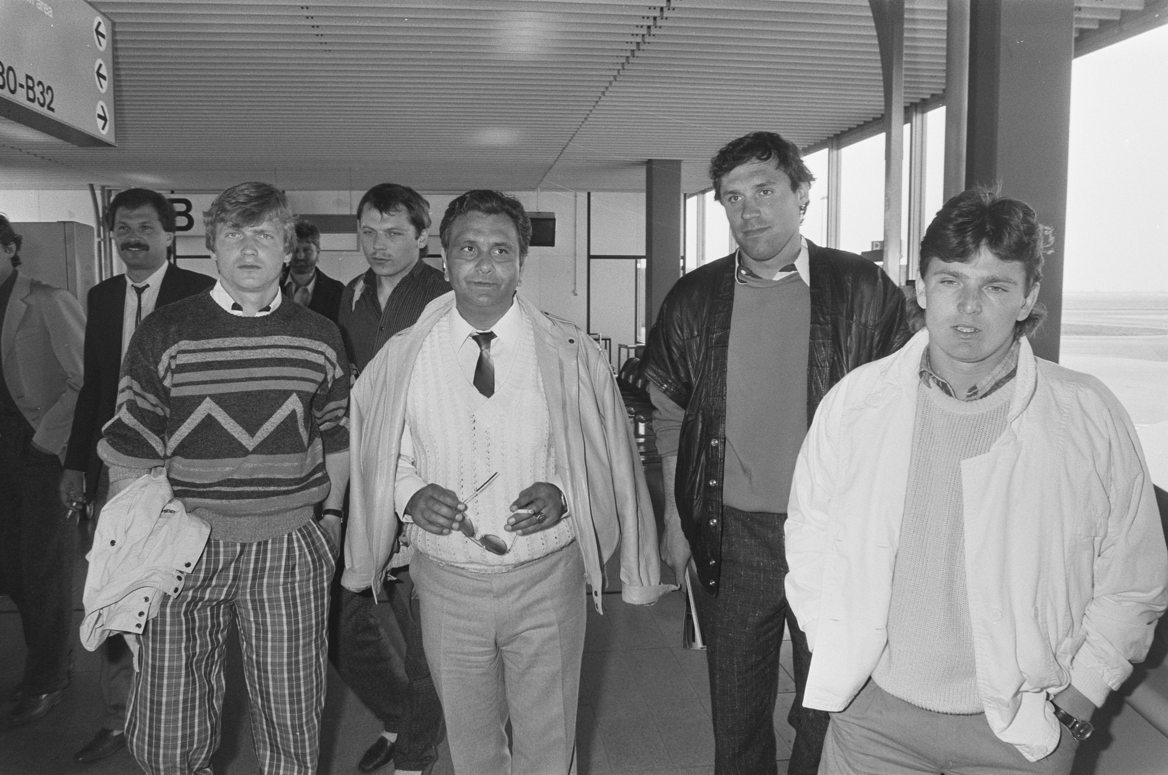 A magyar csapat 1987. április 27-én Verebes József szövetségi kapitány vezetésével megérkezik a hollandiai Schipholba, az Európa-bajnoki-selejtező mérkőzésre. Balról: Détári Lajos, Kiprich József, Verebes József, Híres Gábor, Sallai Sándor